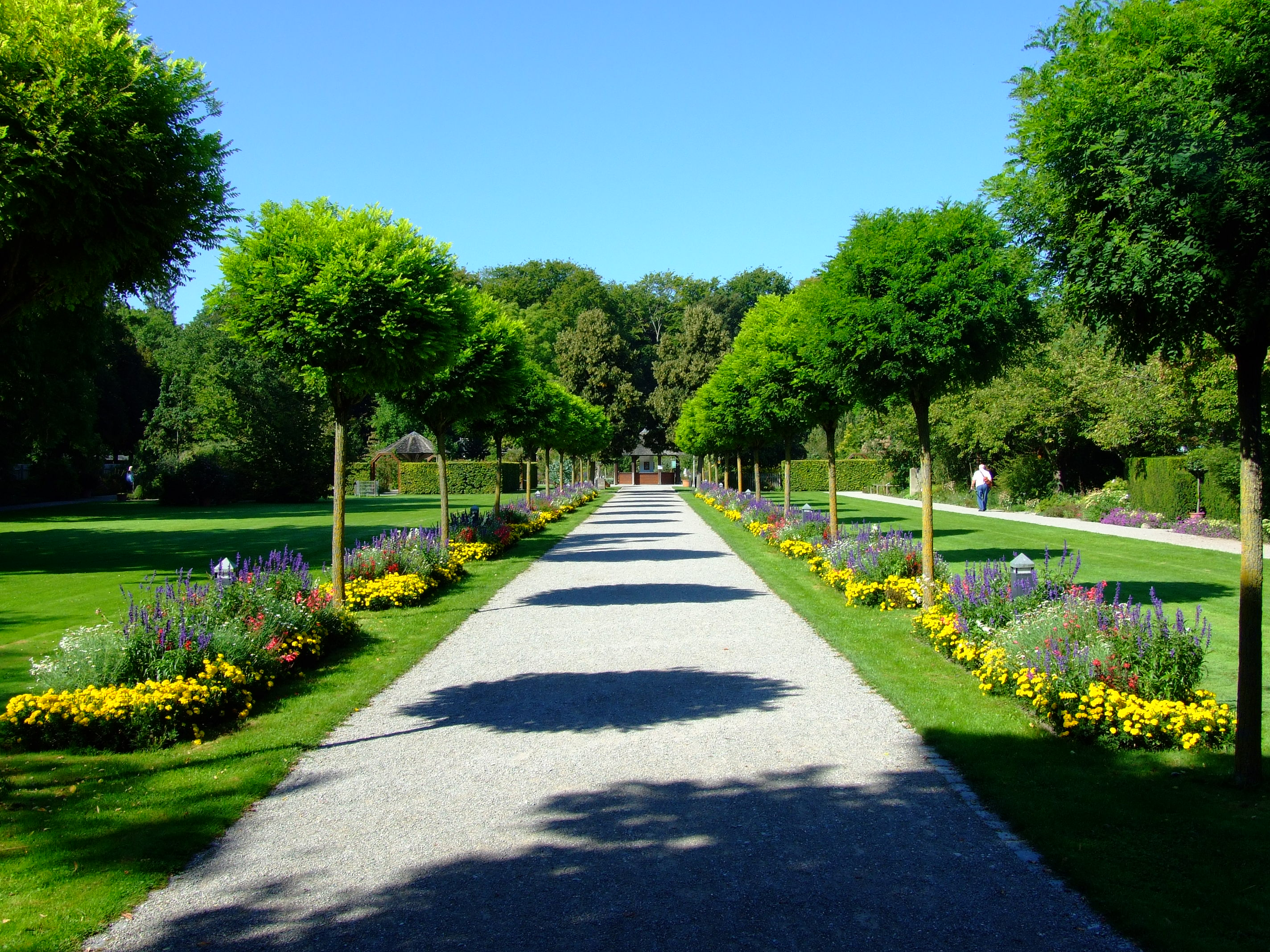 Botanischer Garten Augsburg